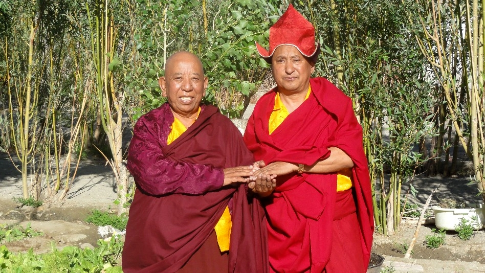 Kyabje Togden Rinpoché & Vén. Tharchin Rinpoché